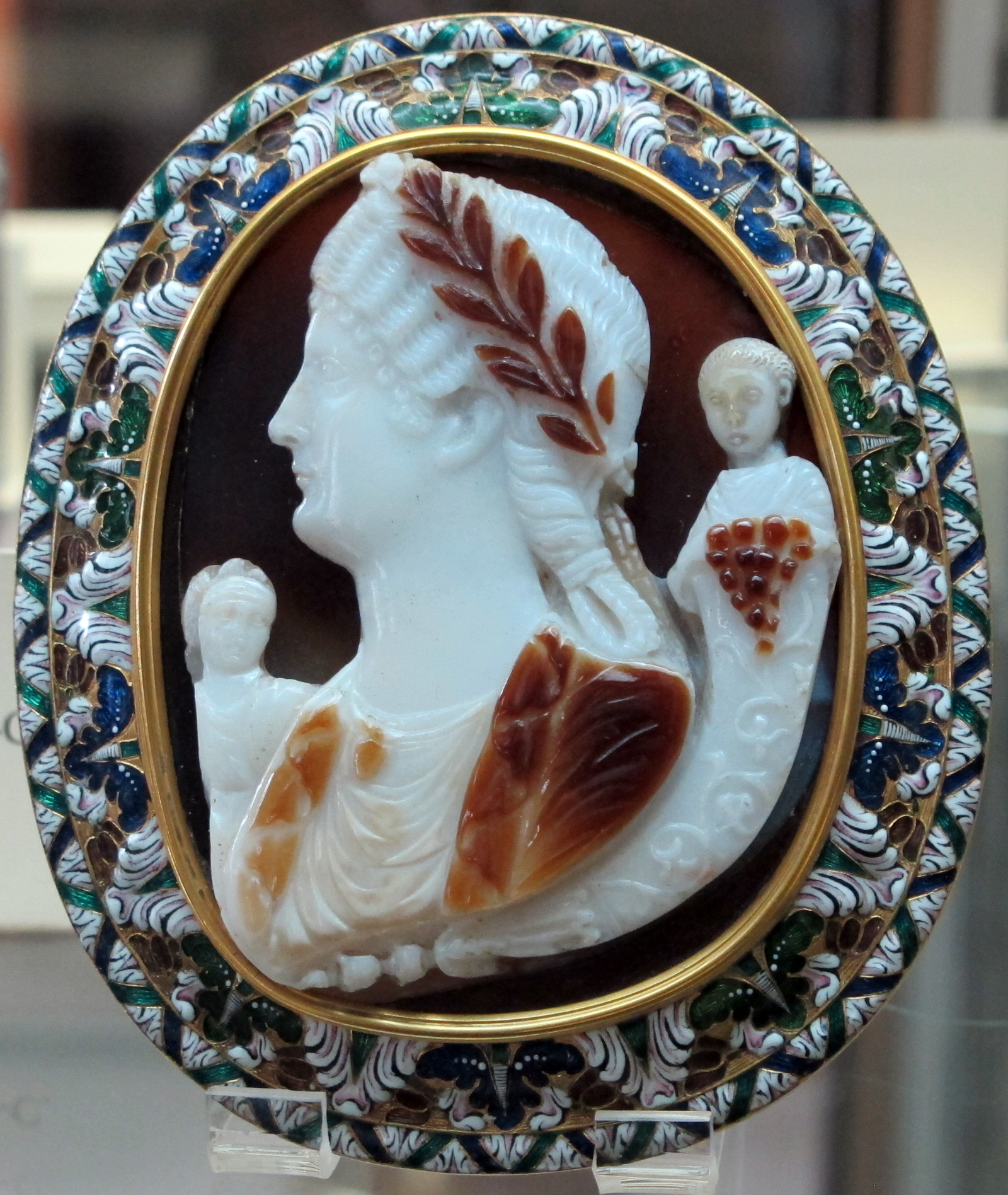 Arte romana, messalina coi figli, sardonice, 40-42 ca.